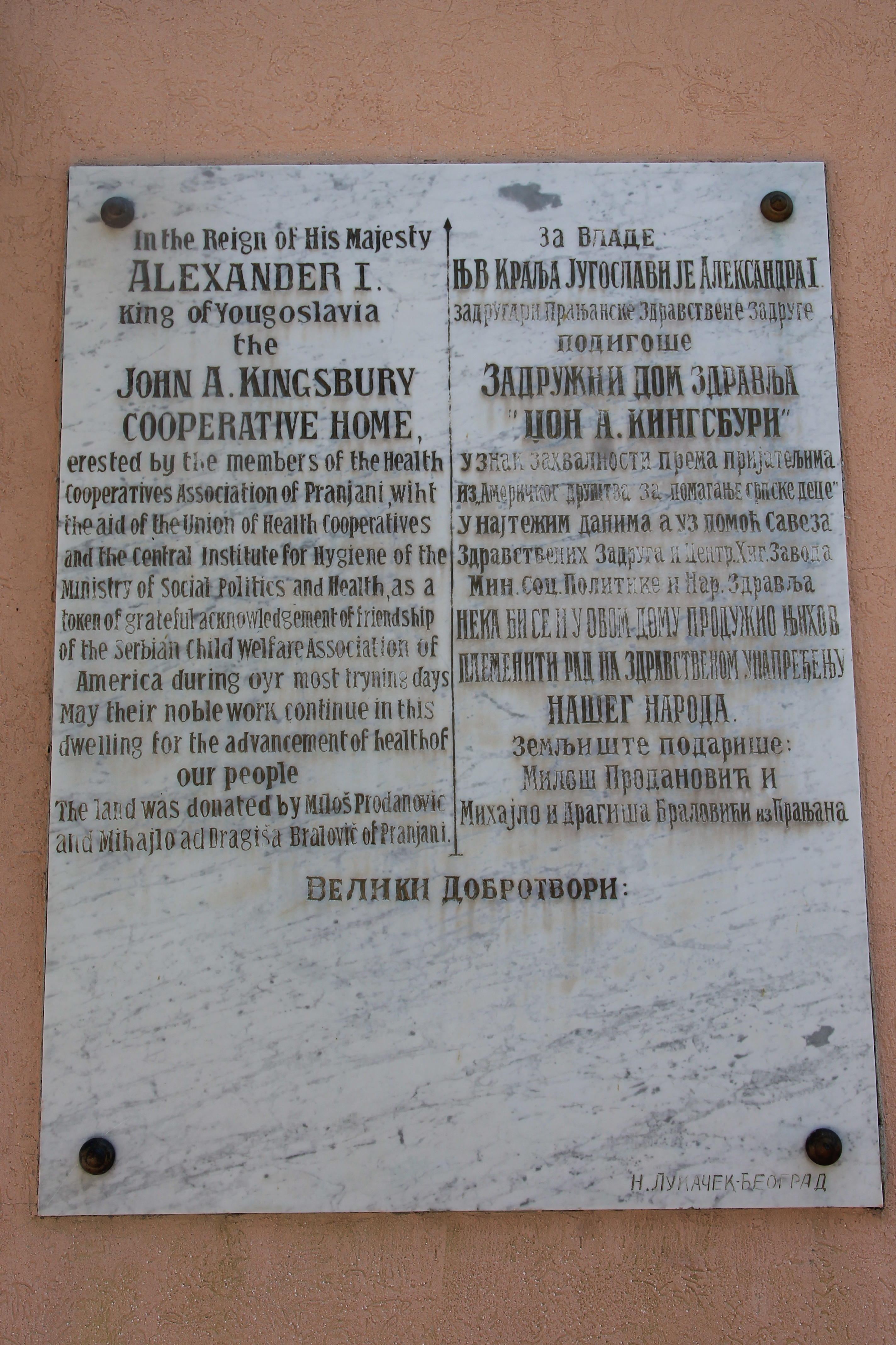 Pranjani